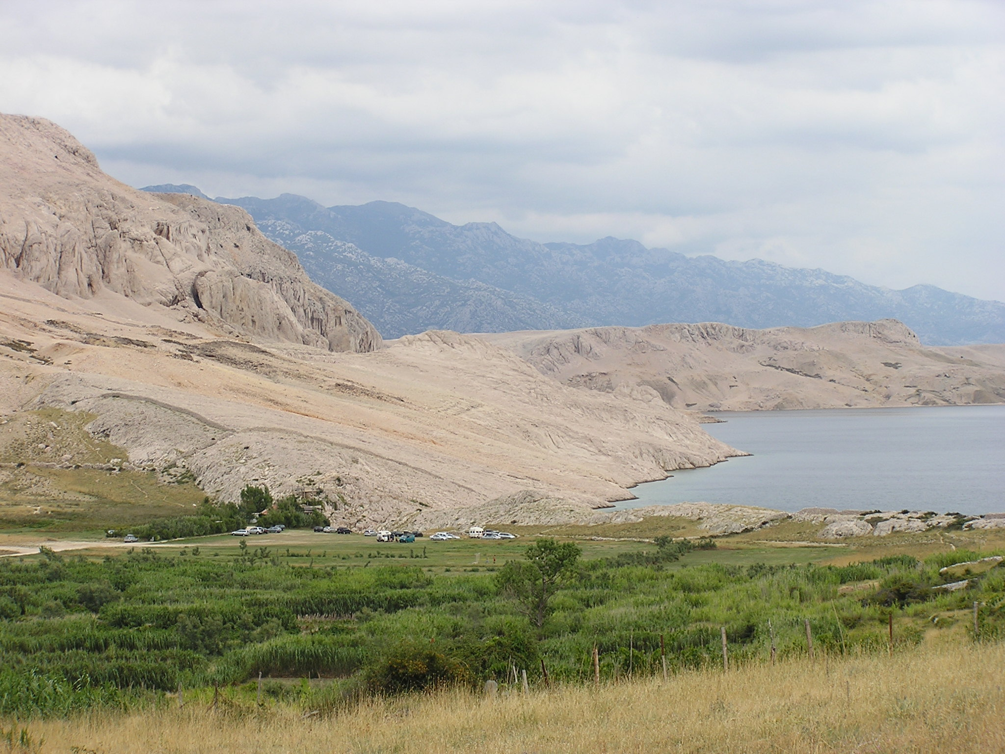 Island Pag